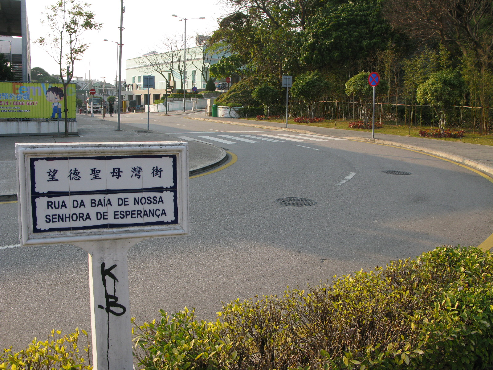 澳門氹仔望德聖母灣街